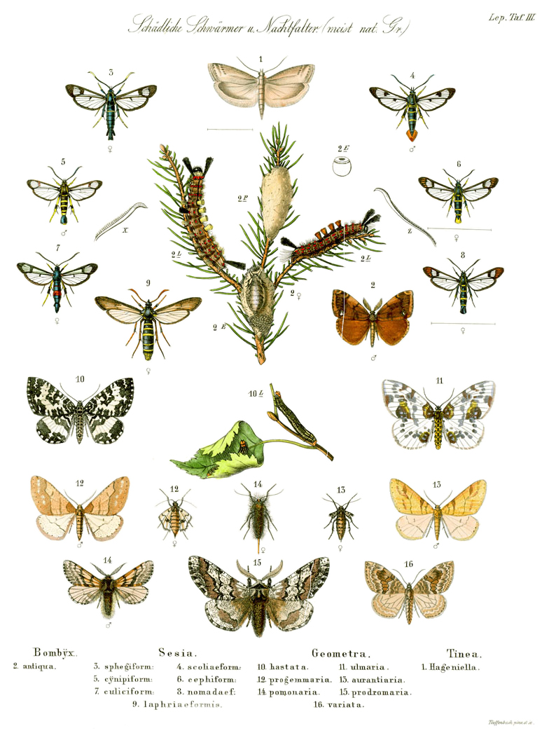 Paintings of some forest insects (butterflies) / Tafel mit einigen Forstinsekten (Schmetterlingen)